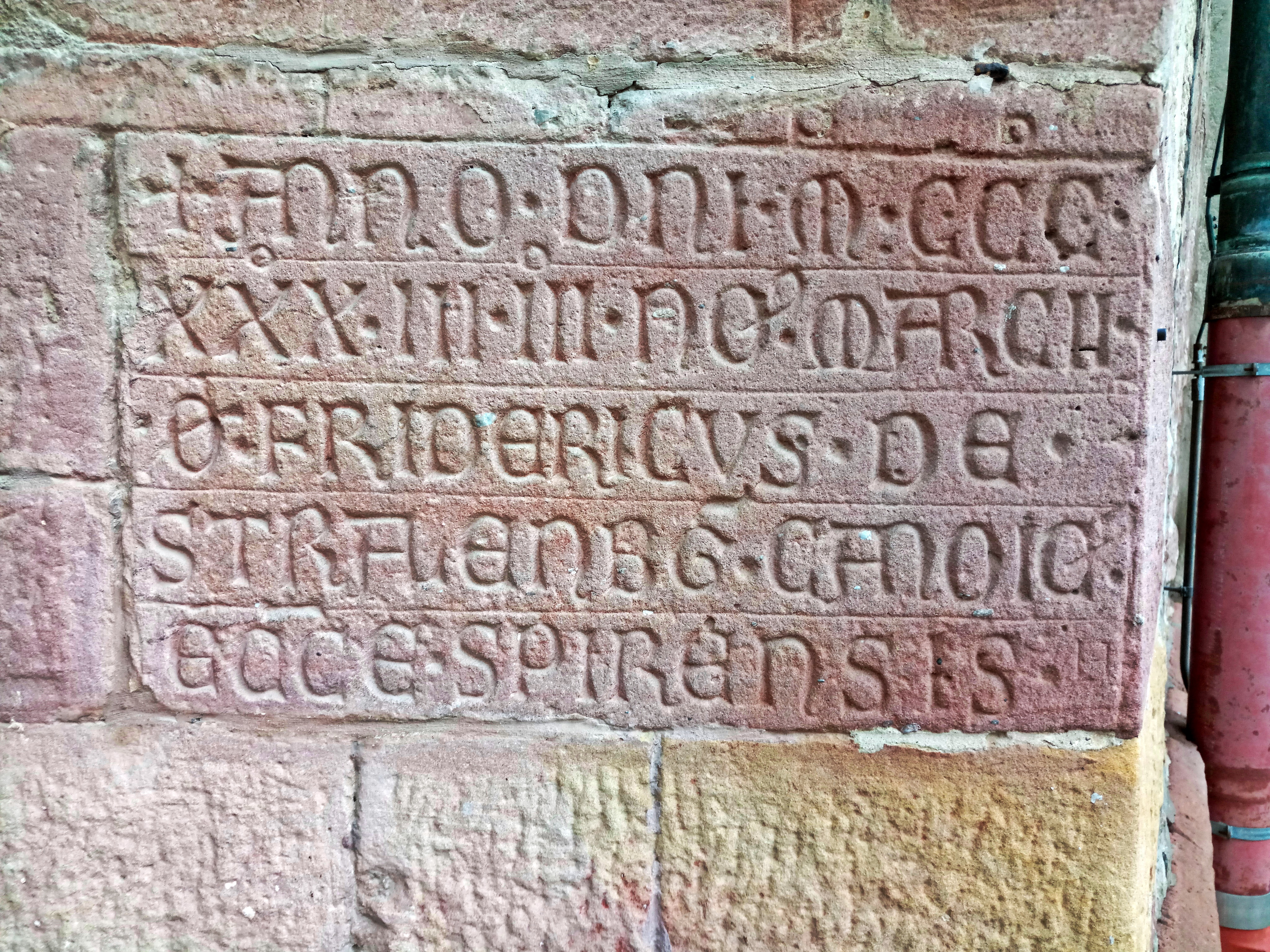 Todesinschrift Domherr Friedrich von Strahlenberg (+1333), Speyerer Dom